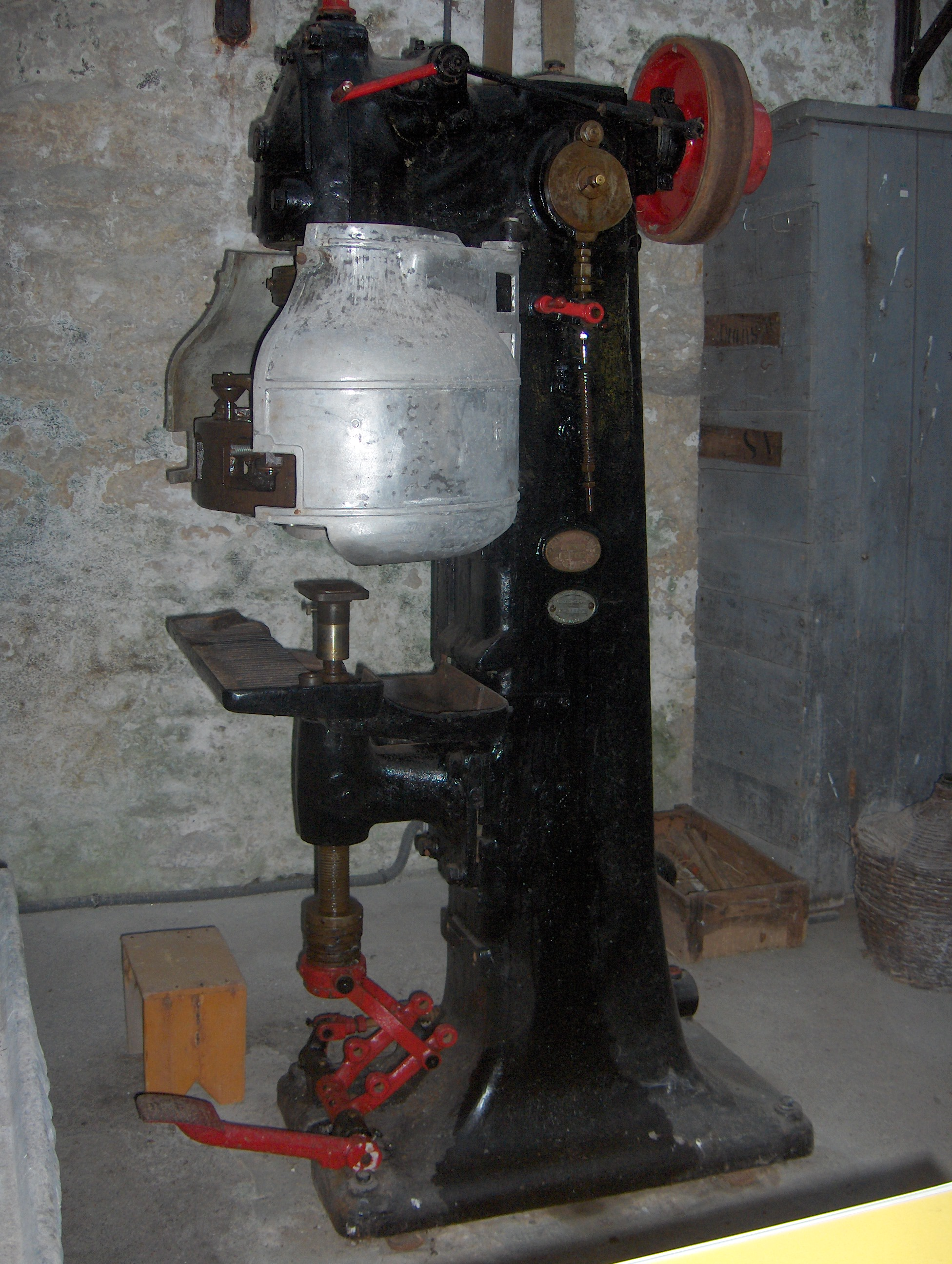 Ancienne conserverie Alexis Le Gall : sertisseuse JJ Carnaud